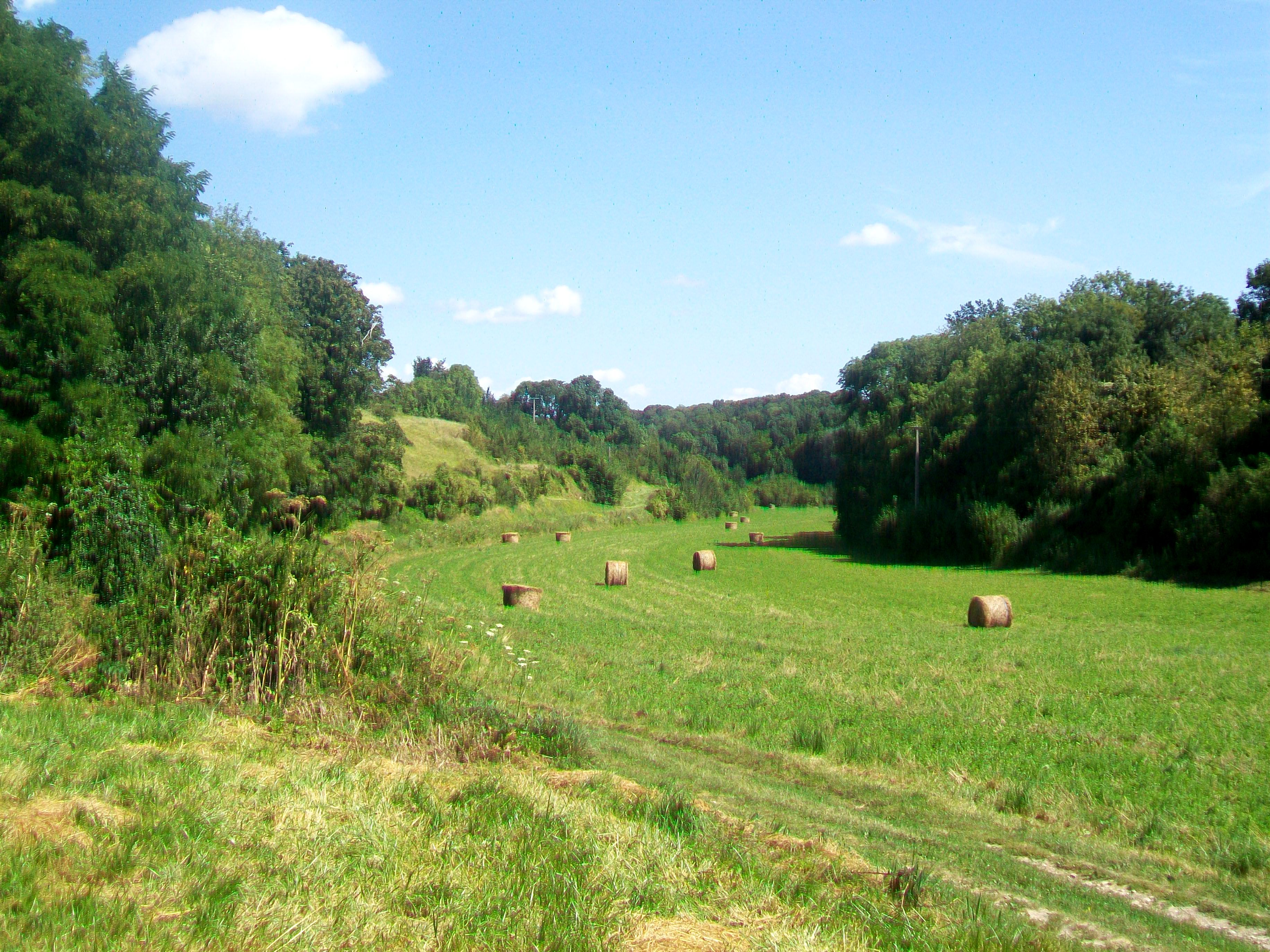 La cavée à l'est du village, dite vallon de Vaucelle ou fond du Rû de la Douye, rejoignant au nord la vallée de l'Automne.